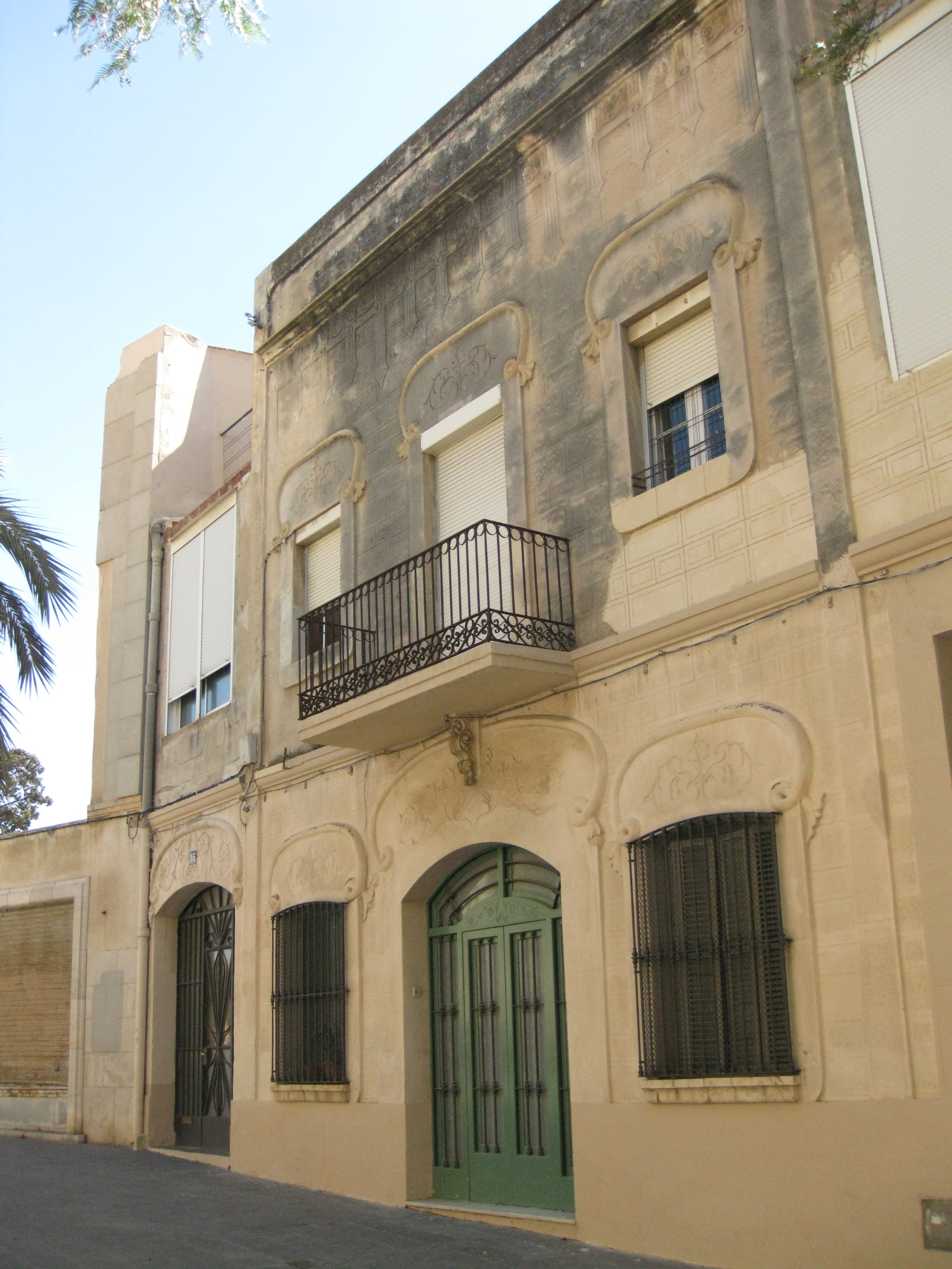 Casa Ripoll II (Tarragona)